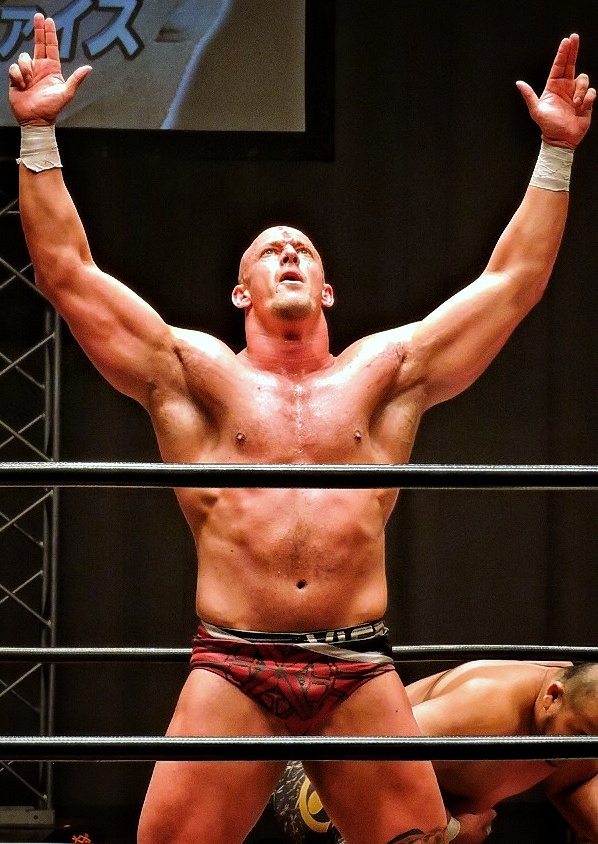 プロレスラーのクリス・ヴァイス